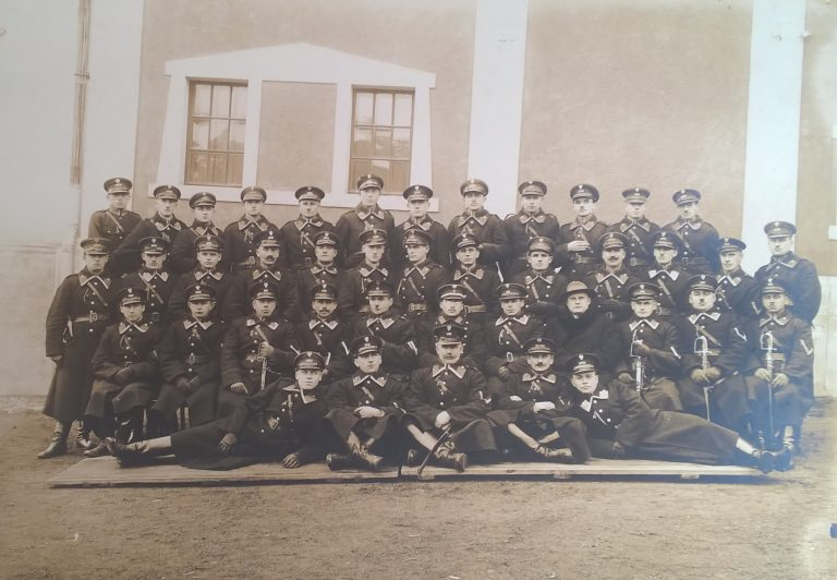 Policjanci w Tomaszowie przed budynkiem OSP przy ul. P.O.W. (zbiory A. Kobalczyka )